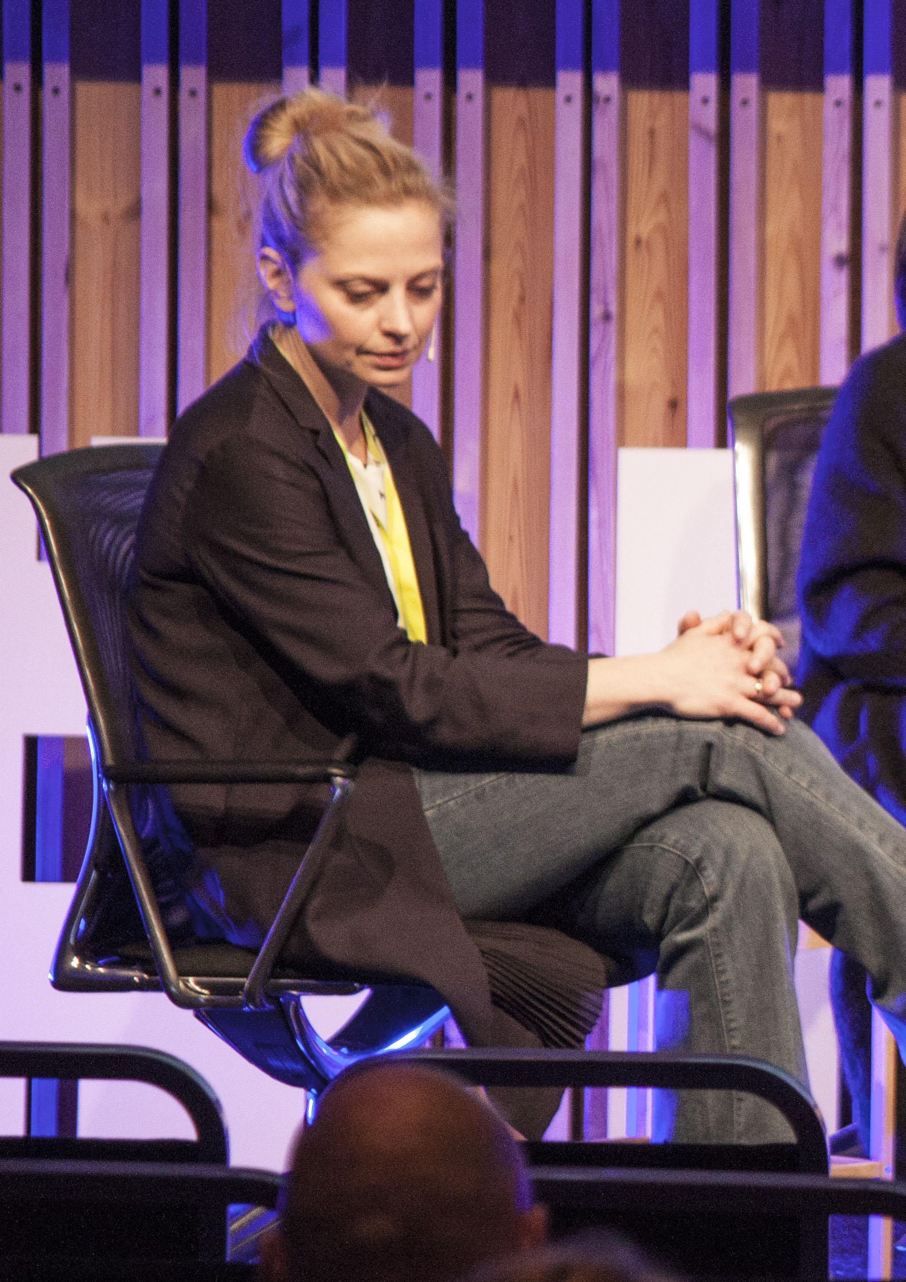 Moderator: Ragna Nordenborg Anna Bachewiig, Siv Rajendram Eliassen